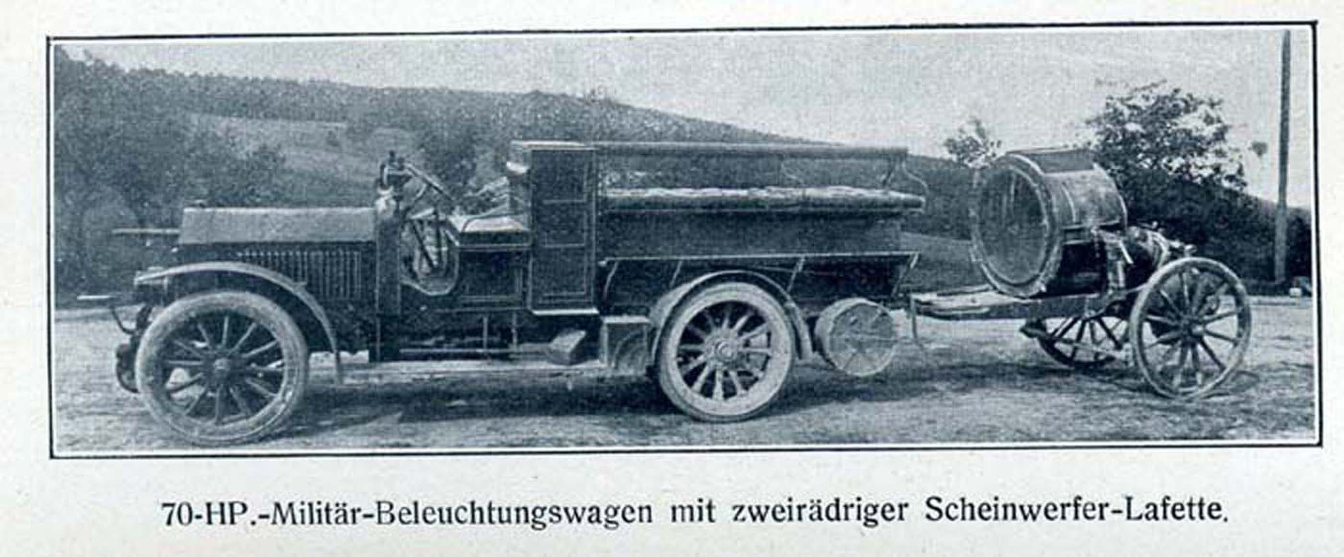 k.u.k. Militär-Beleuchtungswagen von 1910